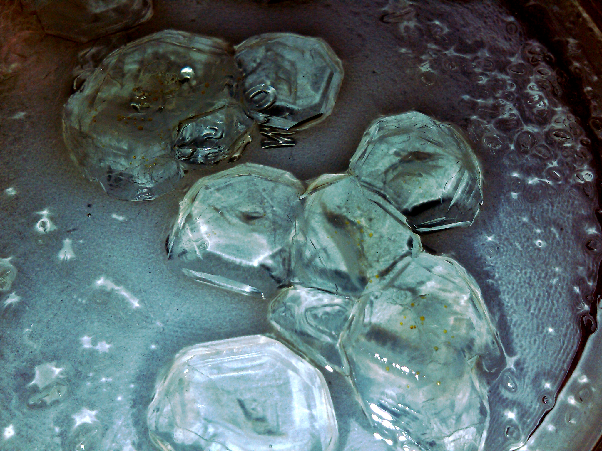 La sal de Mohr, también conocida como sulfato ferroso amónico, se usa en volumetrías de diferentes tipos. Aquí, cristales de la sal en un cristalizador.